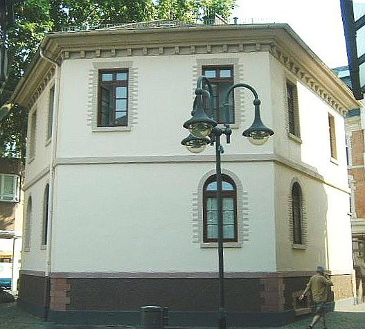 Delkeskampsche Haus in Frankfurt Bockenheim, Leipziger Straße, erbaut 1826, Wohnsitz des Malers und Kupferstechers Friedrich Wilhelm Delkeskamp